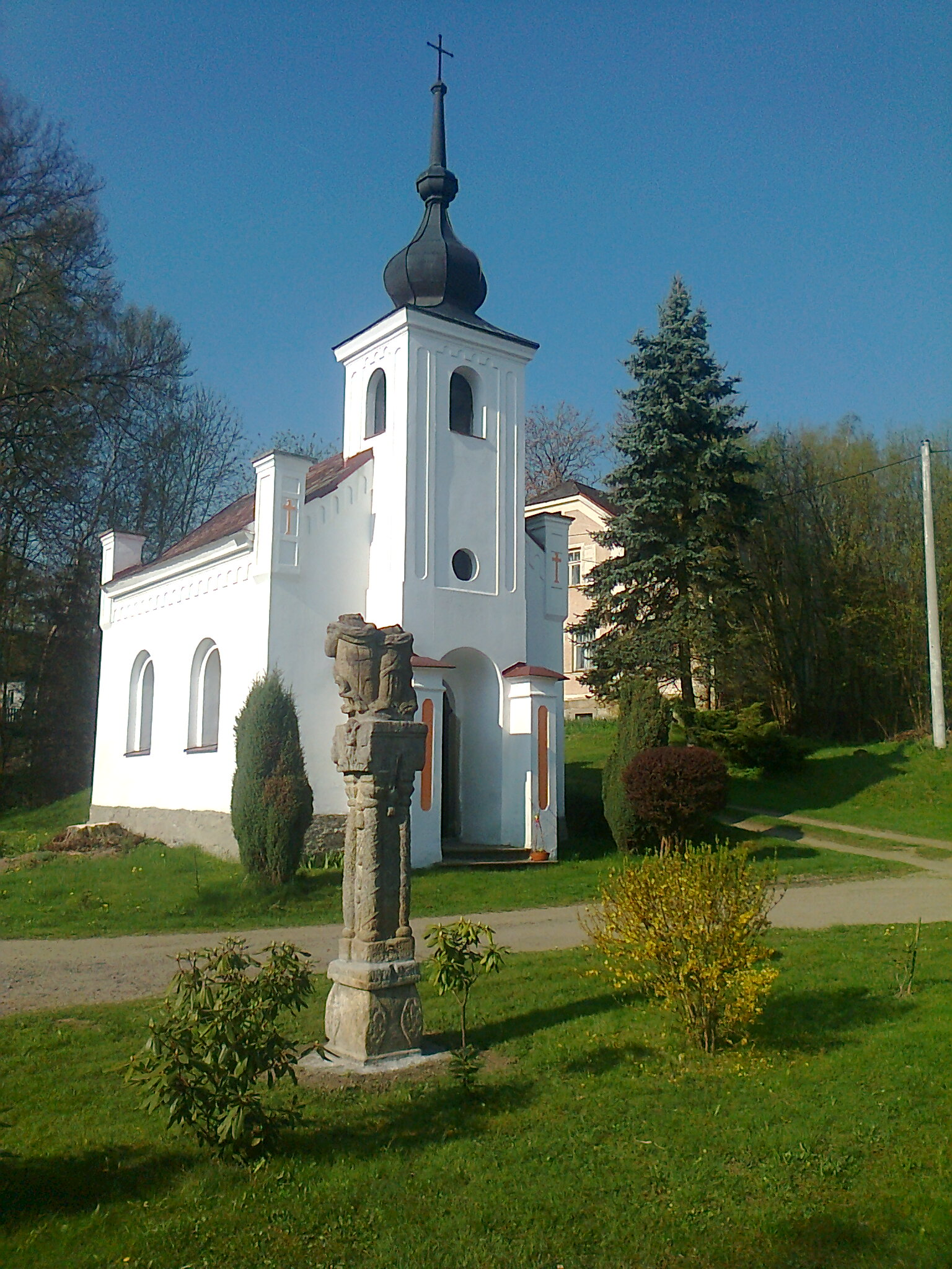 Klíčov